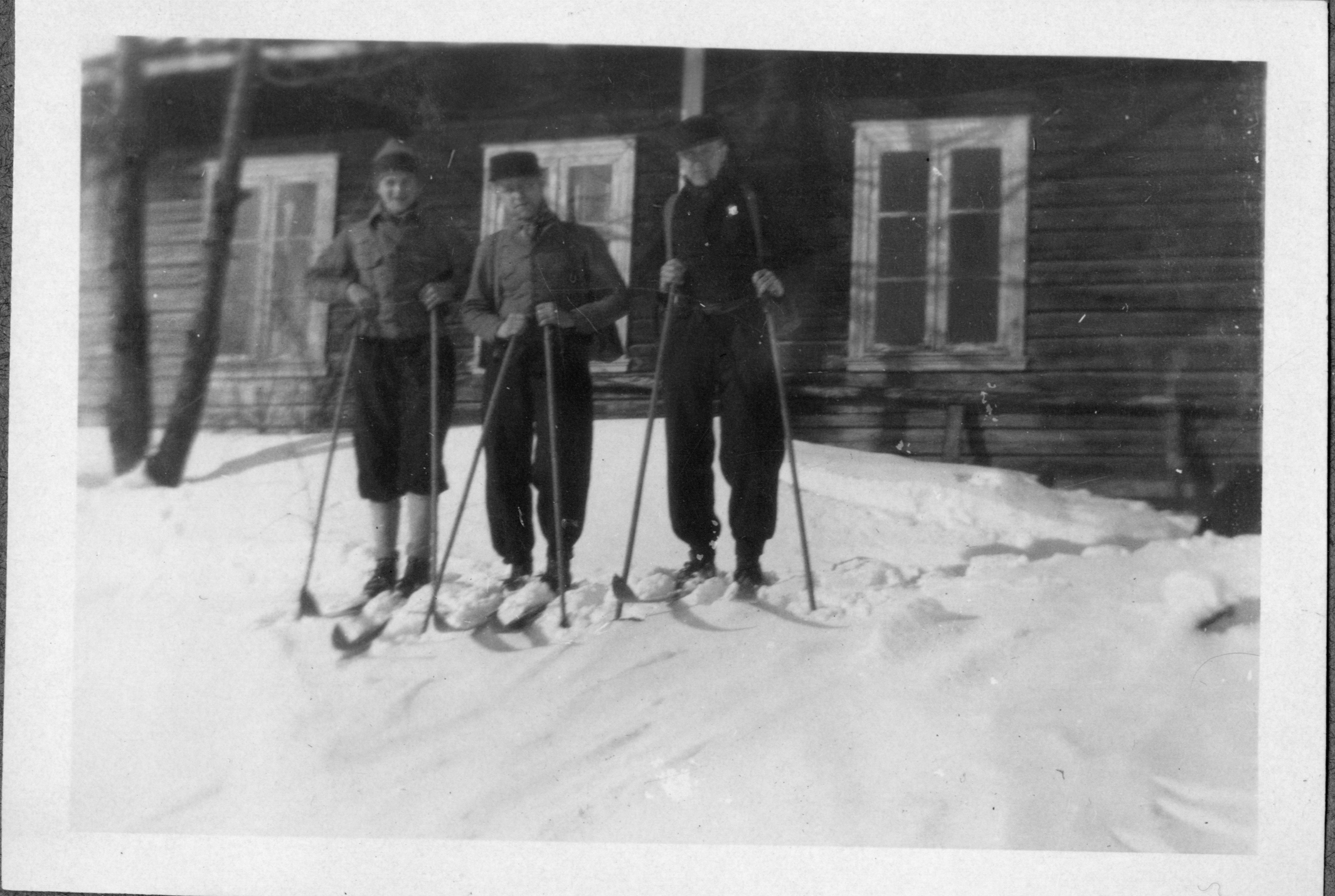 Bildet er hentet fra Arkivverket. Menn på skitur ved Eiksetra i 1931 Arkivinstitusjon : Statsarkivet i Kongsberg Arkivnavn : Turnforeningen Gymnos, Drammen Sted : Norge, Buskerud, , Avbildet